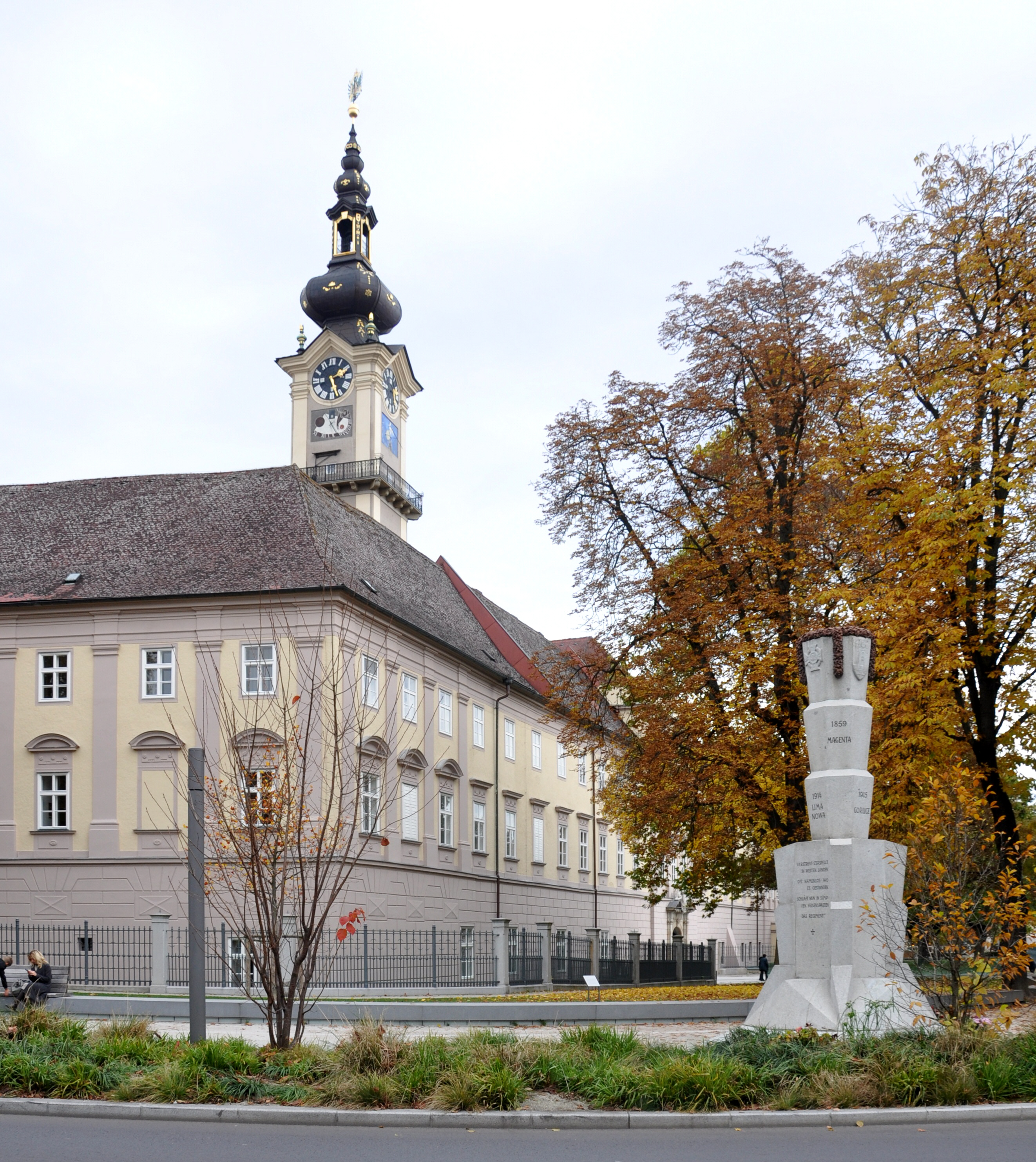 Linz, Linzer Landhaus von der Promenade aus gesehen, rechts das „Hessendenkmal“